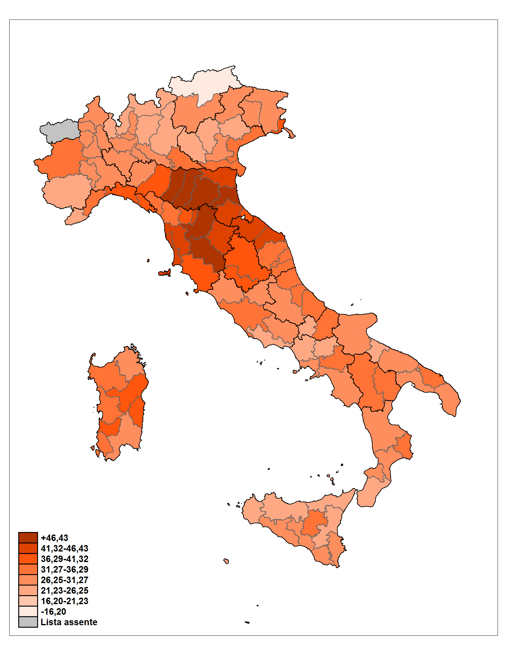 Distribuzione geografica del voto a L'Ulivo nelle elezioni politiche italiane del 2006.